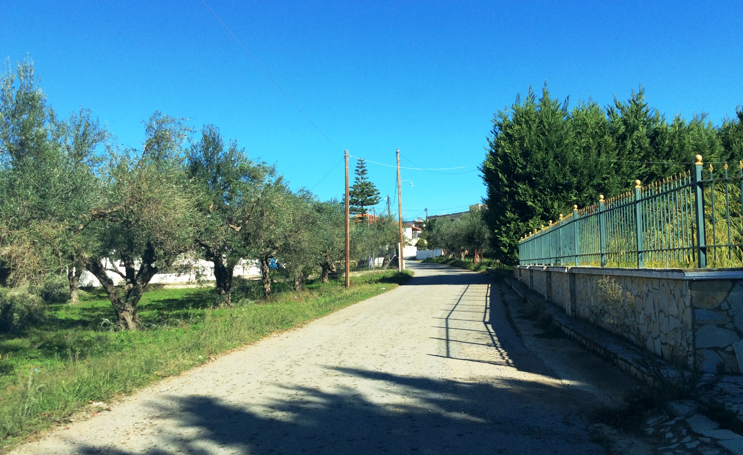 Ρωμανός Μεσσηνίας